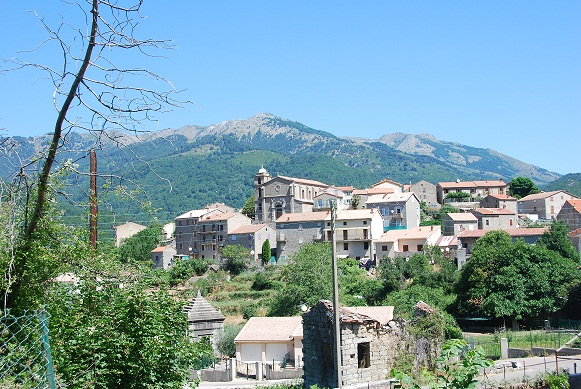 Vue du village de Cozzano (Corse) prise le 2012-07-16